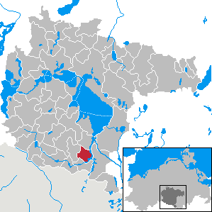 Priborn im Landkreis Müritz, Mecklenburg-Vorpommern